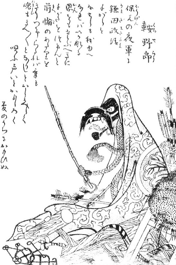 Kura-yarō (鞍野郎) from the Gazu Hyakki Tsurezure Bukuro (百器徒然袋)